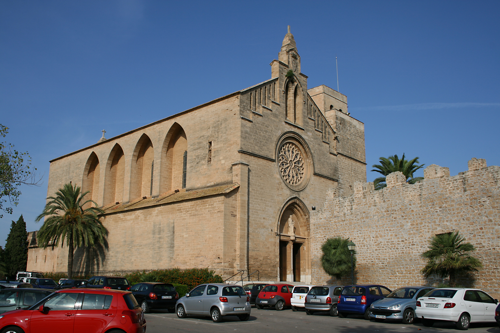 Iglesia de Sant Jaume, Alcúdia, Mallorca, Spain